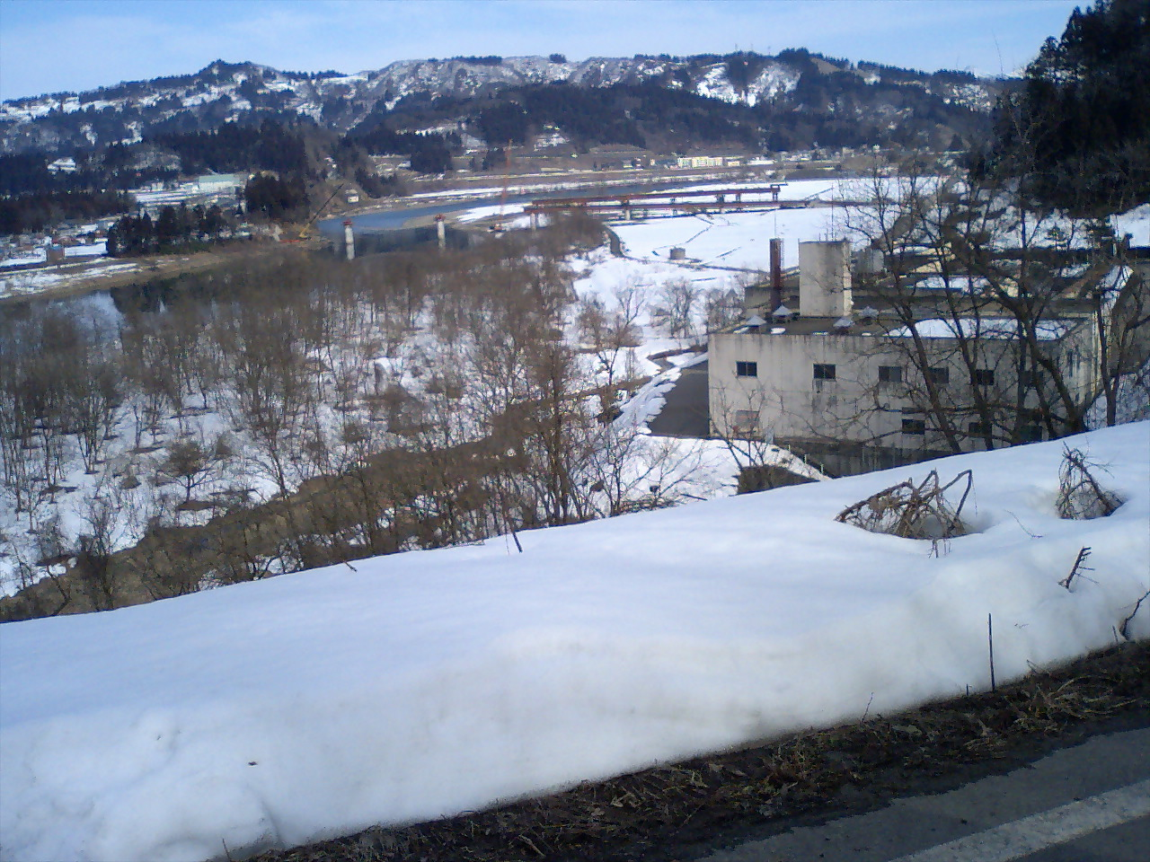 この画像は2009年2月11日投稿者によって新潟県北魚沼郡川口町牛ヶ島(投稿日現在は長岡市川口牛ヶ島)にて撮影された建設途中の牛ヶ島大橋の写真。写真右側に写っている施設は「小千谷市衛生センター清流園」。（投稿日現在の住所は長岡市川口牛ヶ島2537-1）